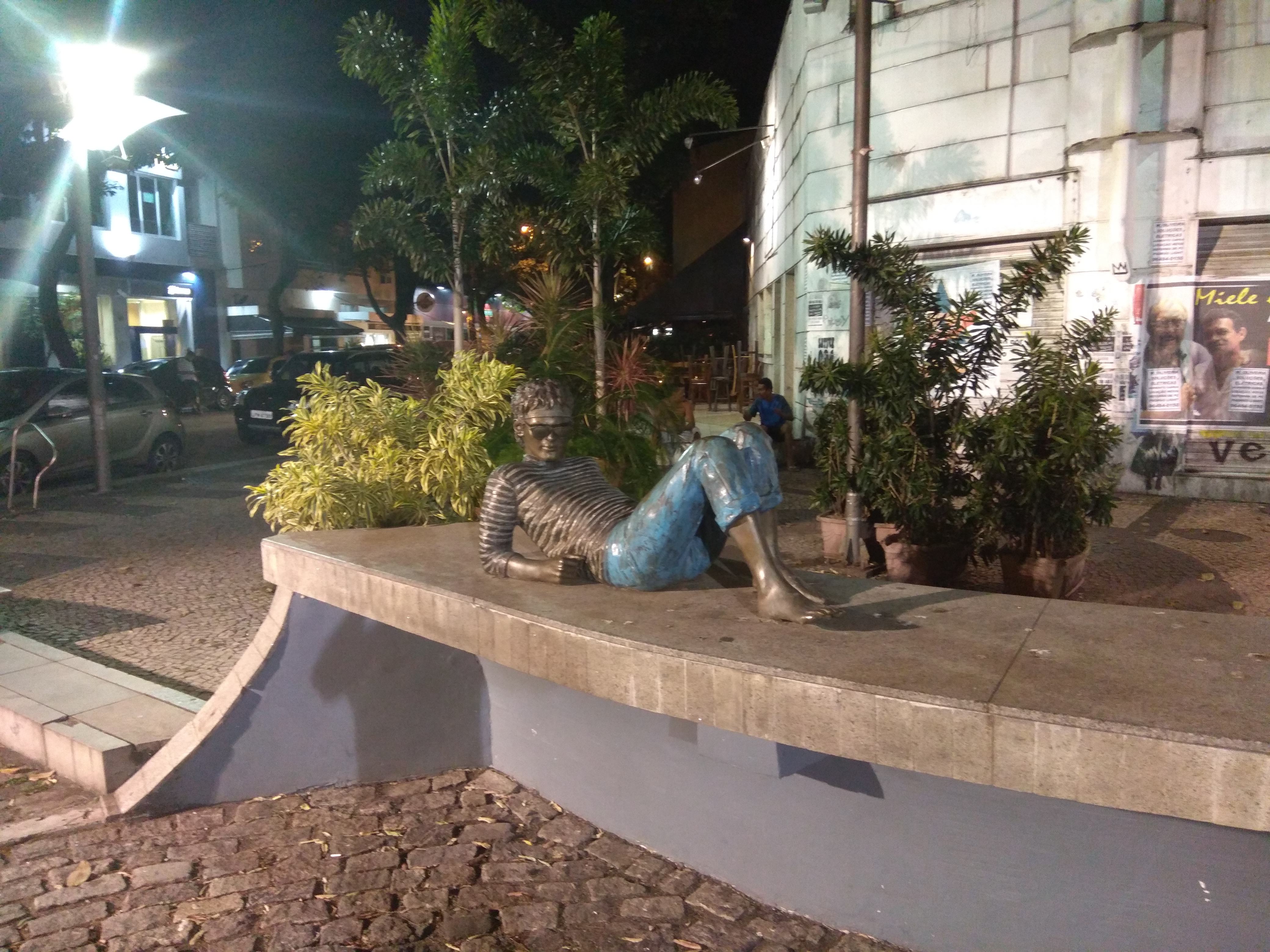 Estátua do Cazuza no Leblon, Rio de Janeiro.